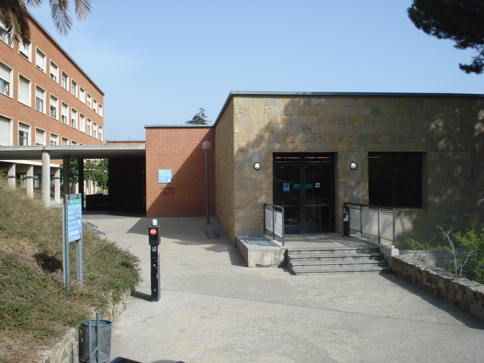 Campus Mundet de la Universitat de Barcelona